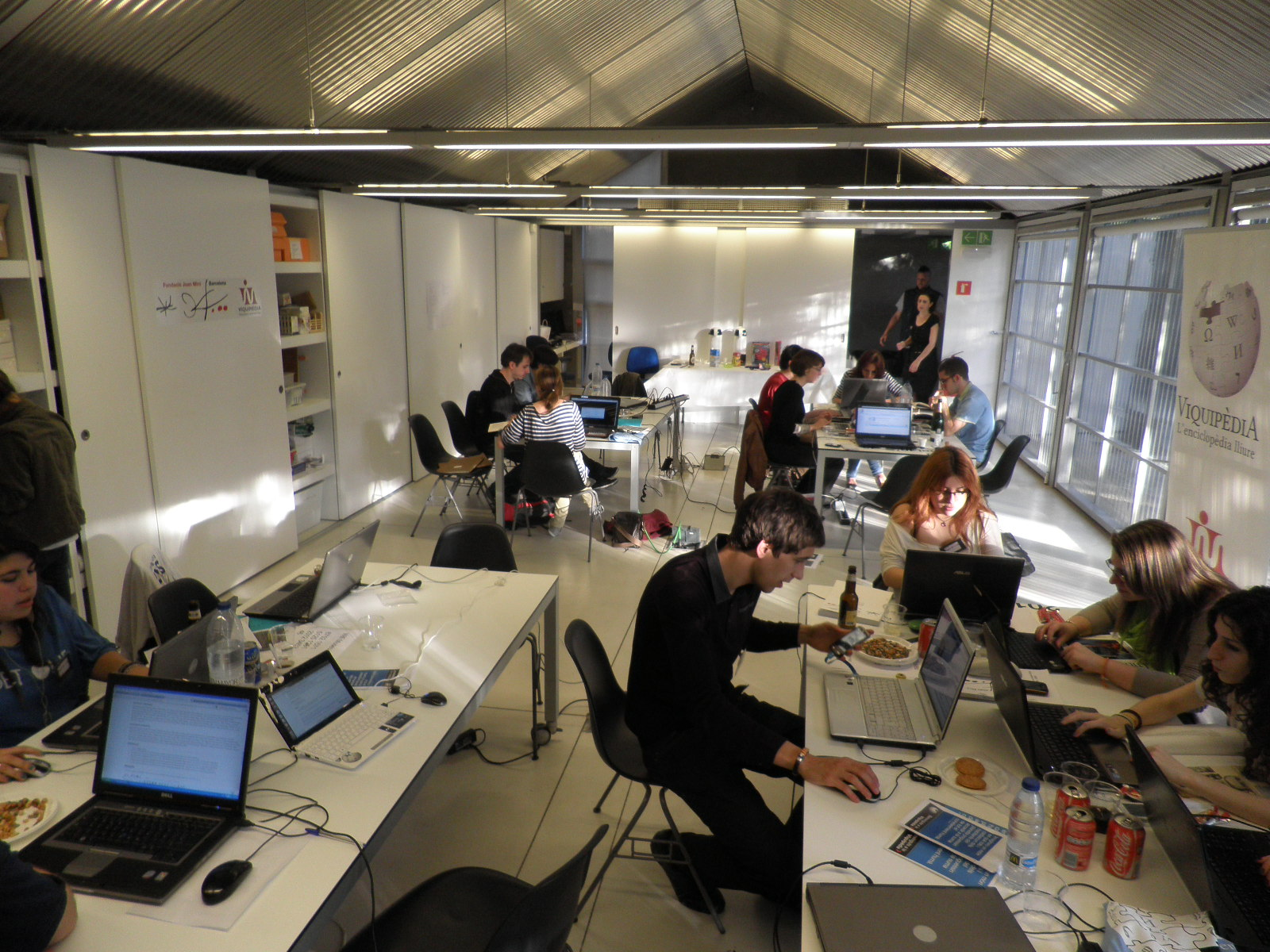 Viquimarató d'edició de 35 hores a la Fundació Miró de Barcelona amb motiu dels 35 anys de la sala Espai 13. Tarda de divendres a l'Espai Taller editant articles sobre artistes a Viquipèdia.